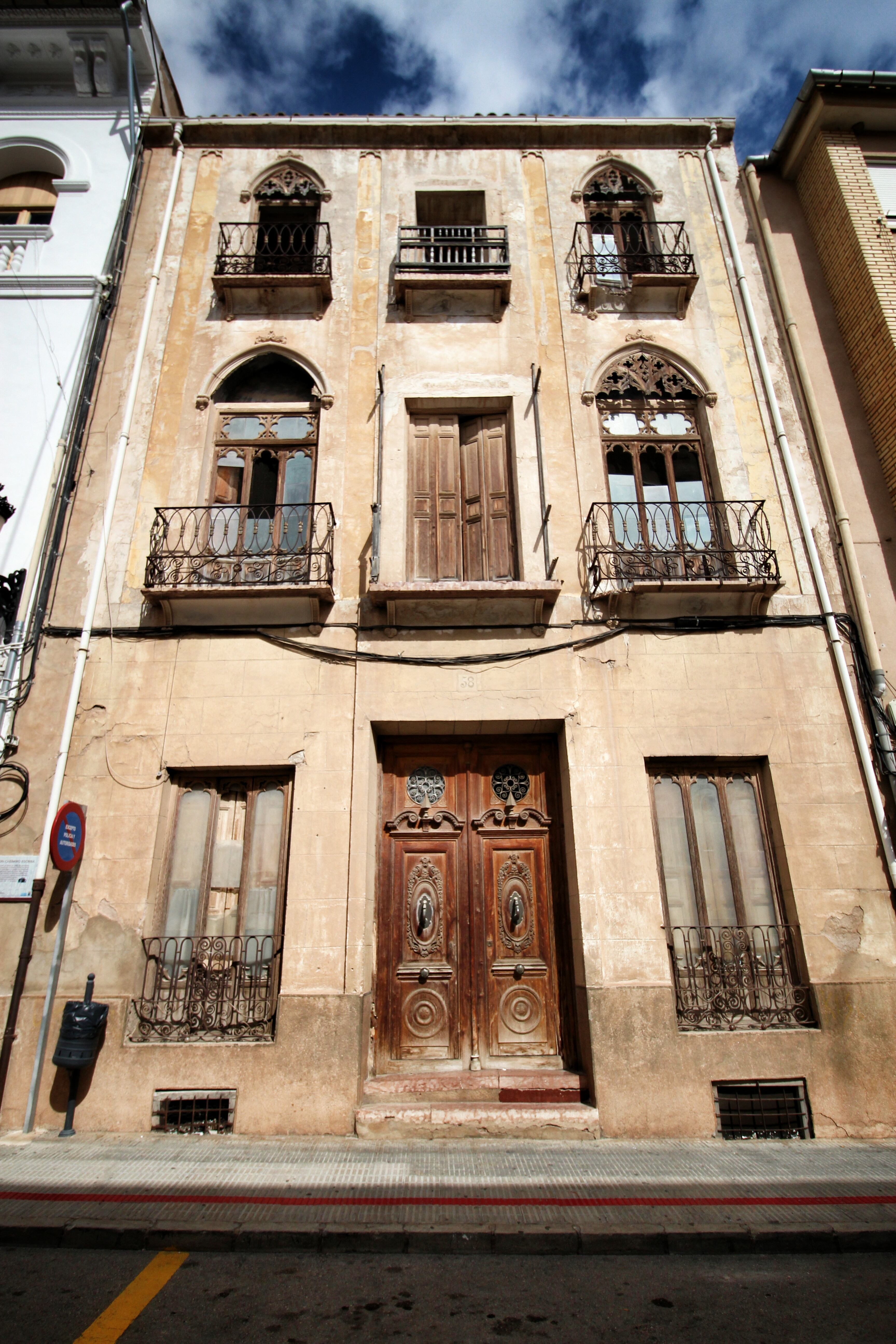 Fachada de la Casa del pintor Don Casimiro Escribá en Ayora